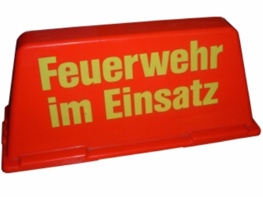 Dachaufsetzer "Feuerwehr im Einsatz"